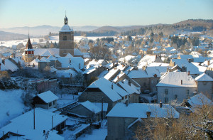 Vue hivernale d'Orgelet (Jura)